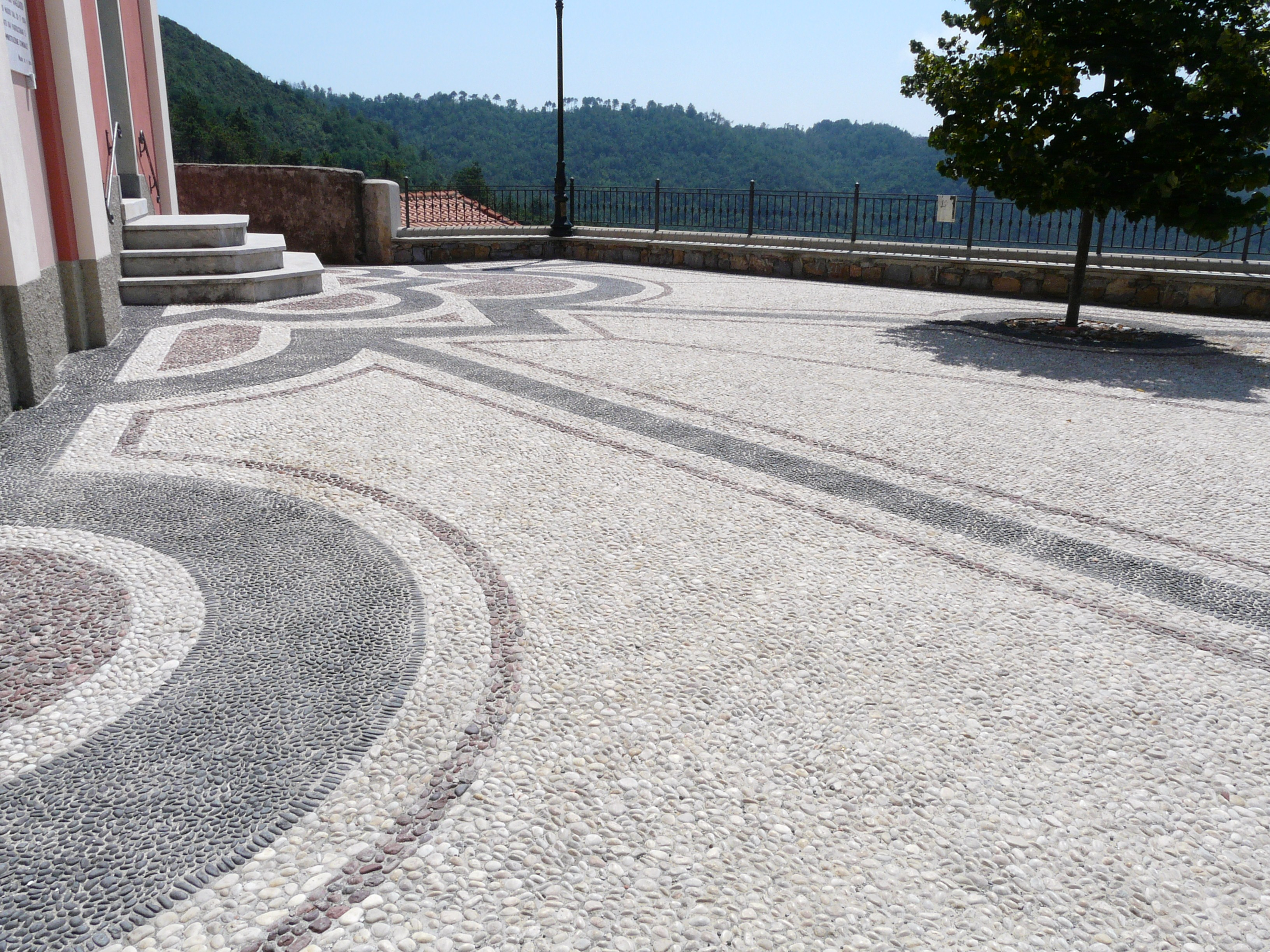 Sagrato della Chiesa di San Michele Arcangelo della frazione di Masso, Castiglione Chiavarese, Liguria, Italia